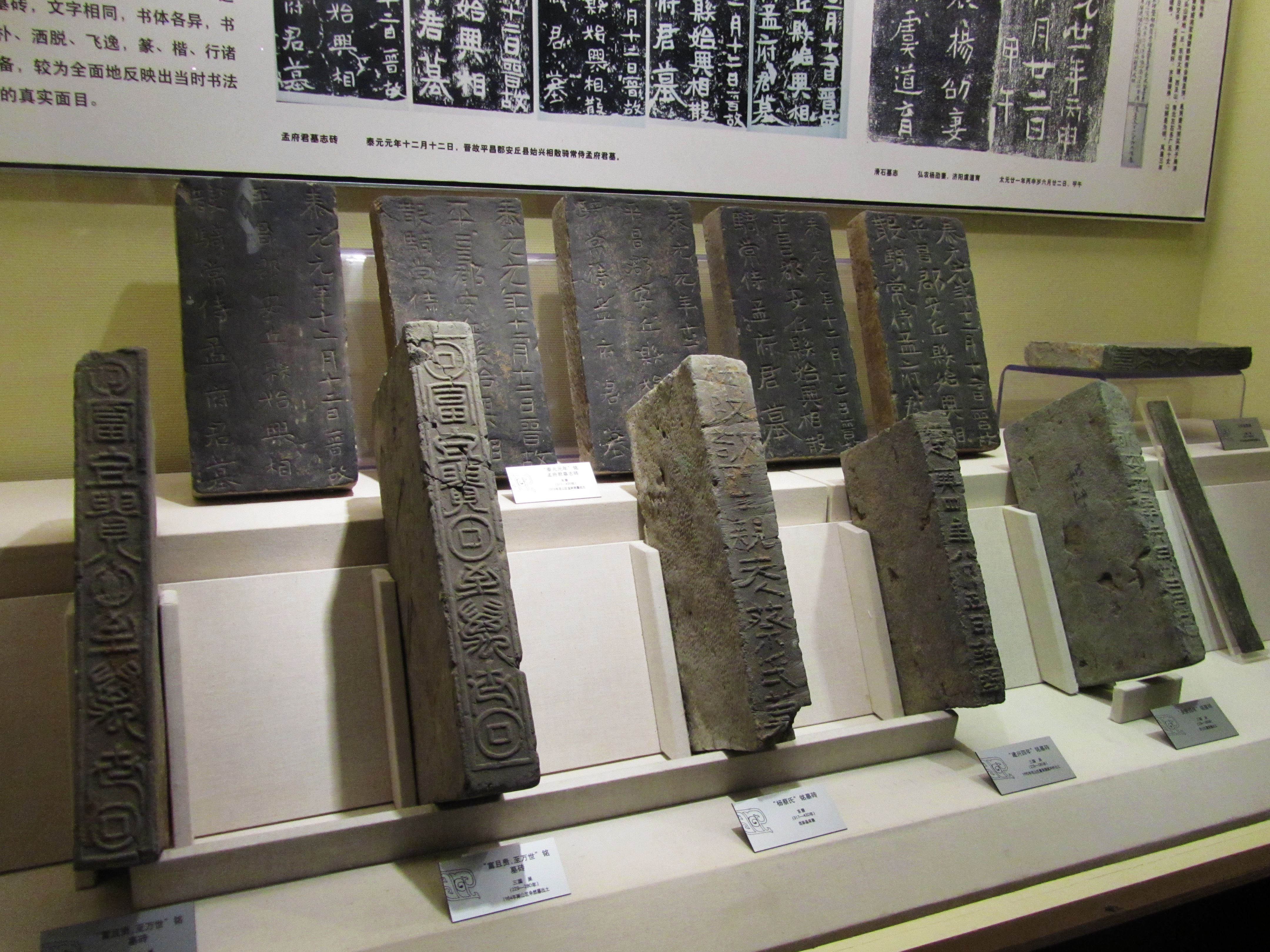 朱然墓墓砖（左起第一块和第二块），上有“富且贵，至万世”铭文，马鞍山市博物馆藏。